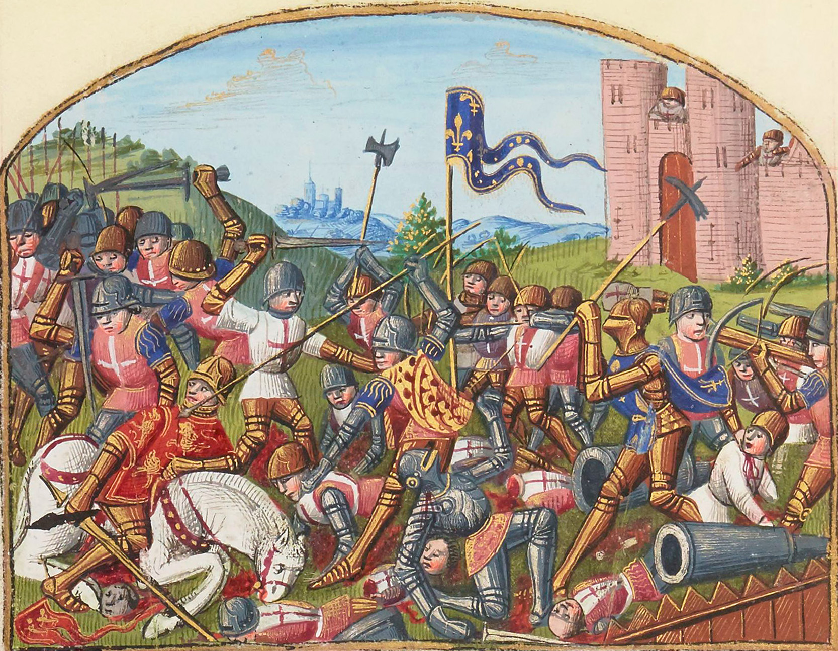 La mort de Talbot à la bataille de Castillon, le 17 juillet 1453. Enluminure du manuscrit de Martial d'Auvergne, Les Vigiles de Charles VII, vers 1484, BnF, Manuscrit Français 5054, enluminure du folio 229 verso (détail).